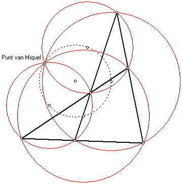 Miquel point of a complete quadrilateral